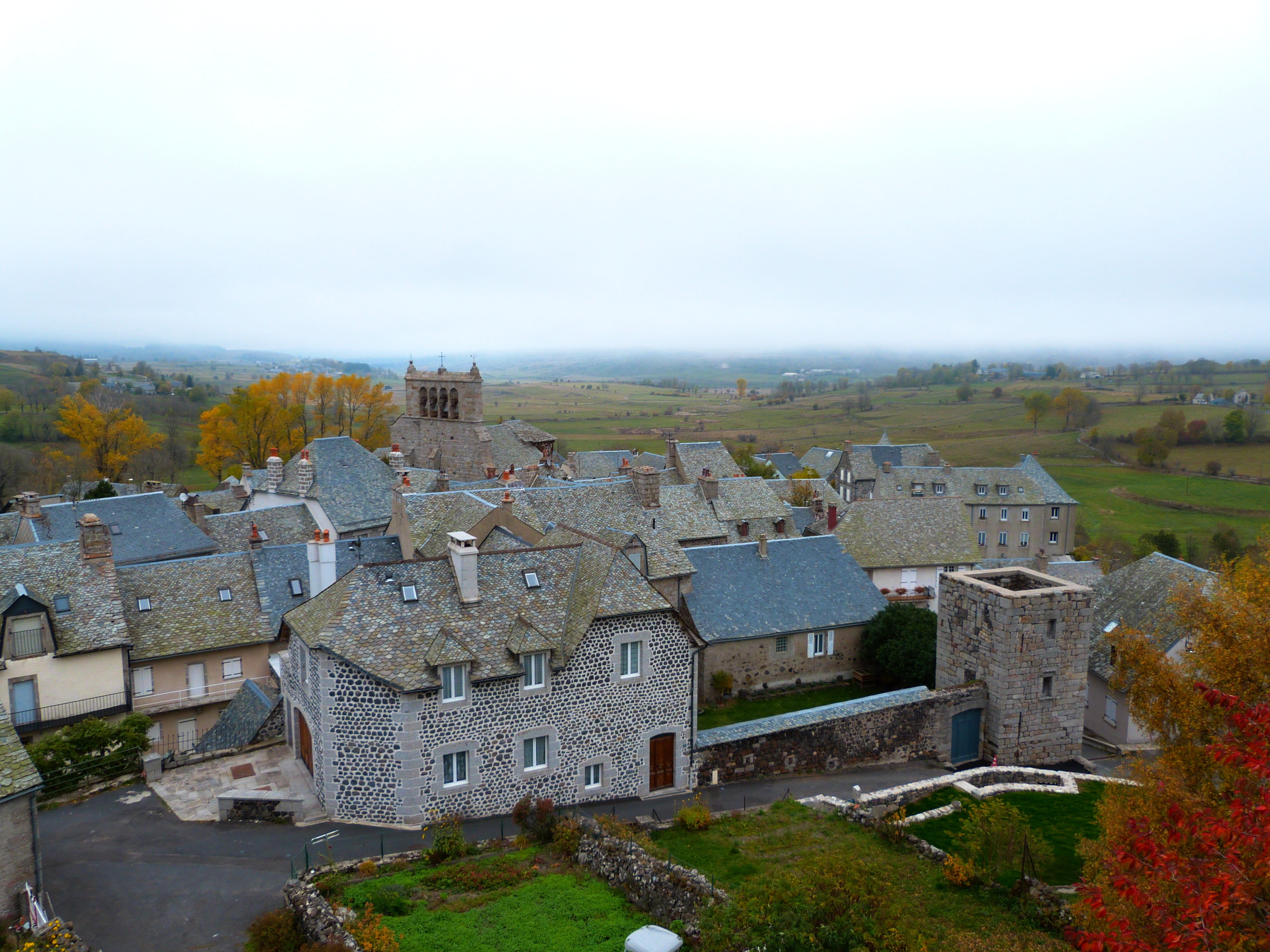 Vue sur les toits de Saint-Urcize et le plateau de l'Aubrac depuis le Rocher de la Vierge